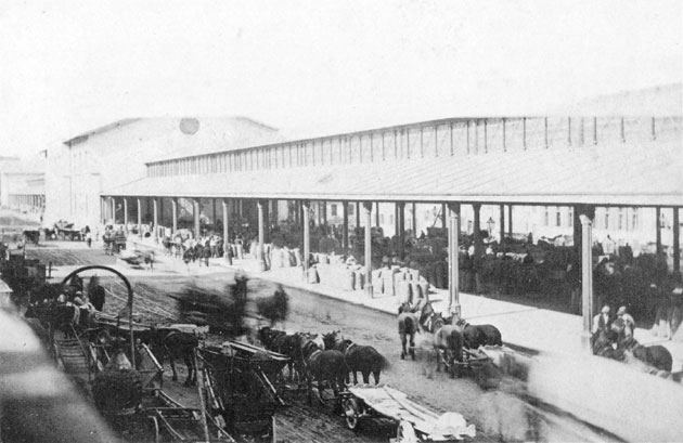 München, Südteil der Schrannenhalle